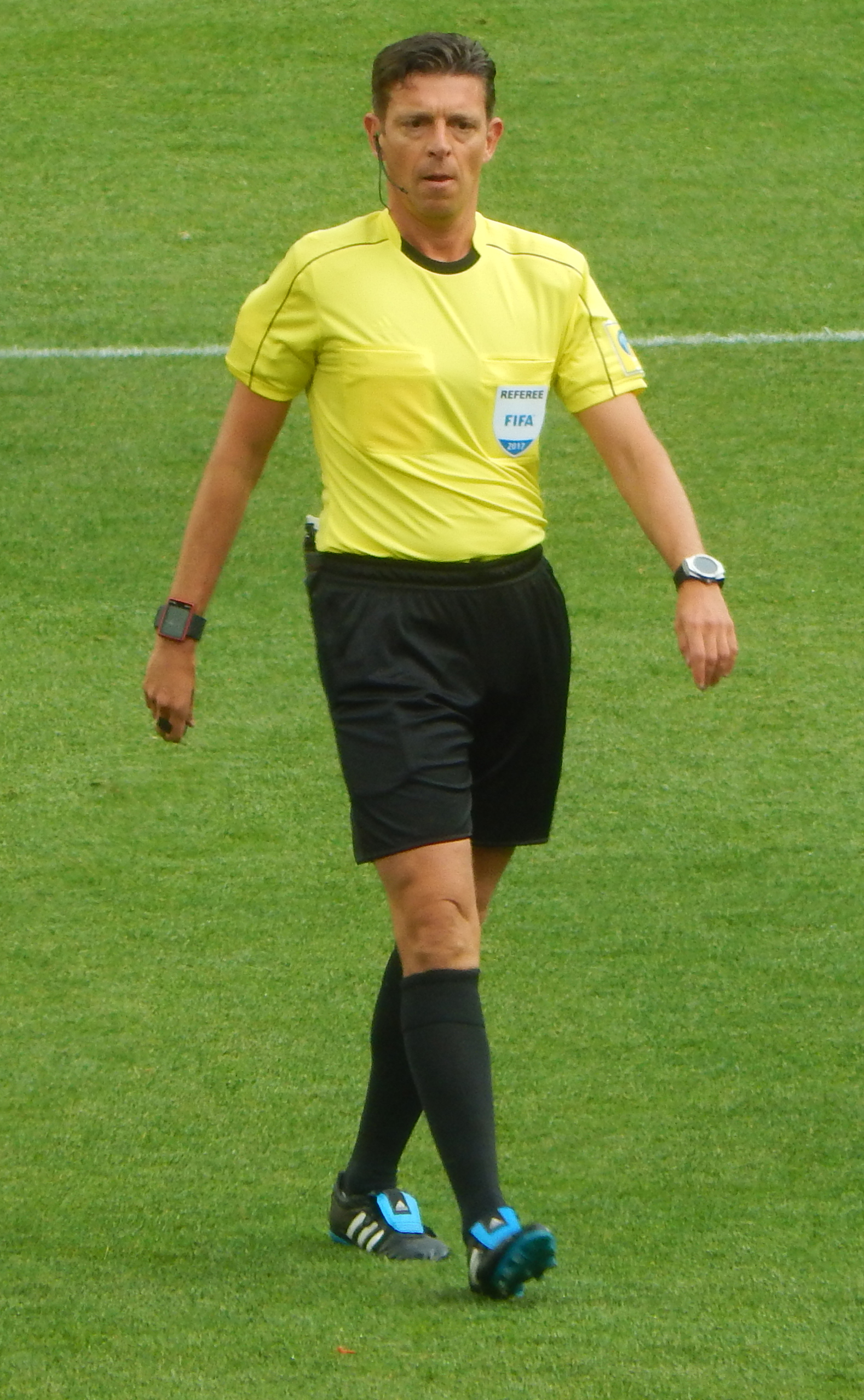 Судья Джанлука Рокки Матч Чили – Австралия